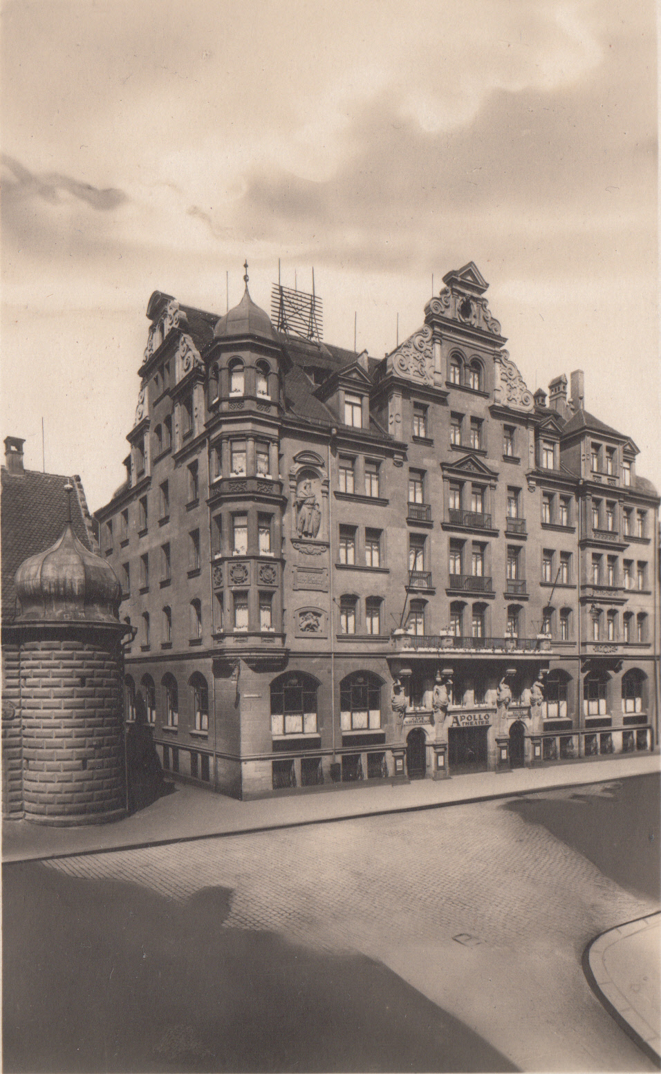 Ansichtskarte v. Apollo-Theater Nürnberg